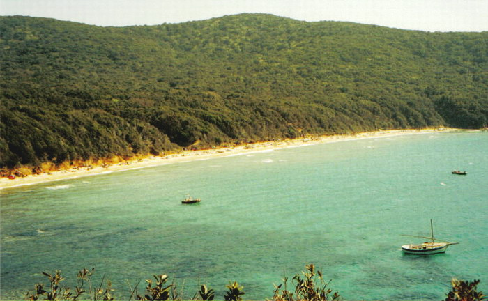 descrizione: Veduta di Cala Violina, suggestiva spiaggia di sabbia bianca nel comune di Scarlino (GR) lavoro personale di Vinattieri Matteo che lascia in pubblico dominio il 02/02/2007; foto scattata da apparecchio non digitale nel marzo 2002 e rielaborata successivamente